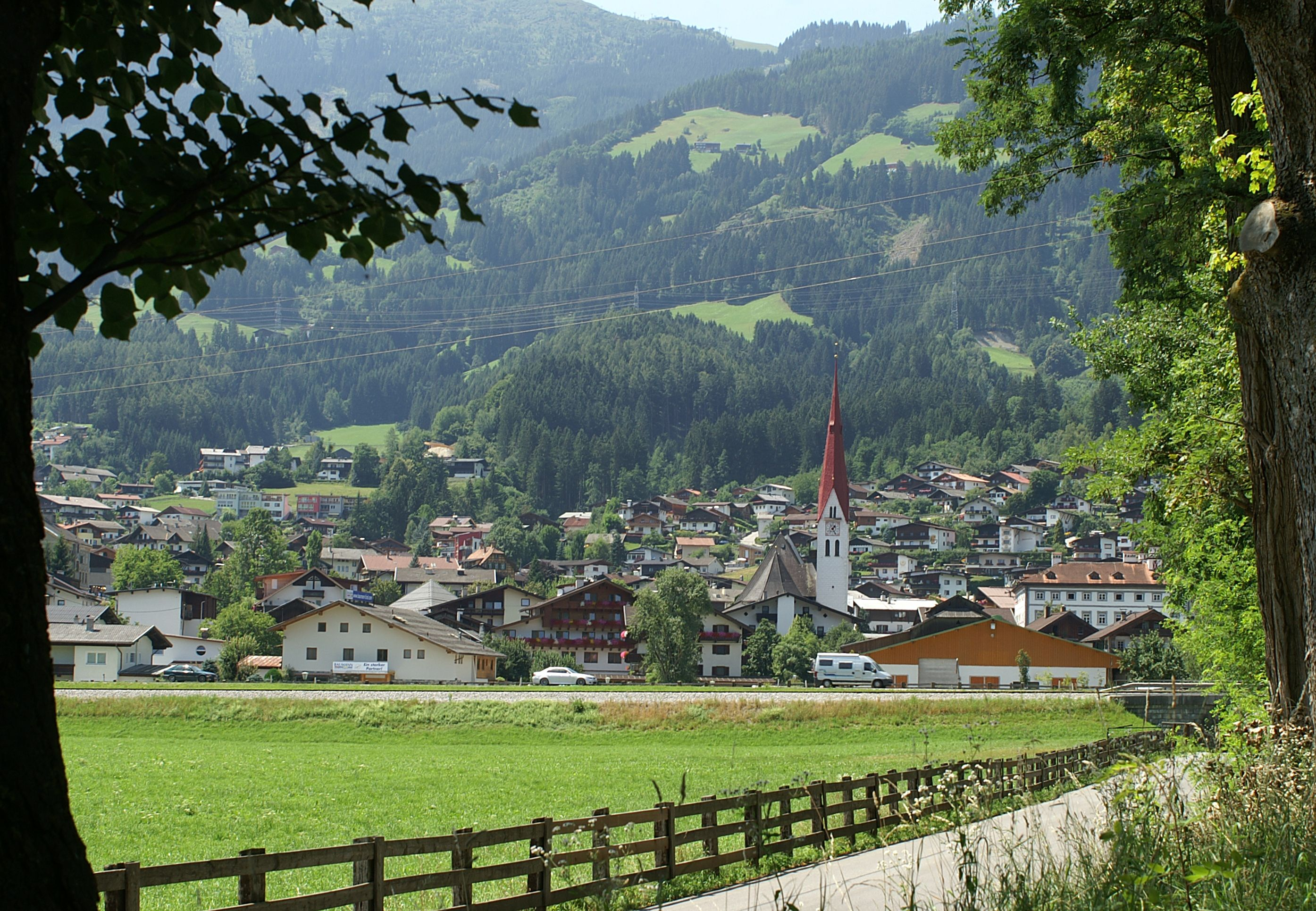 Gemeinde Fügen im Zillertal, Tirol